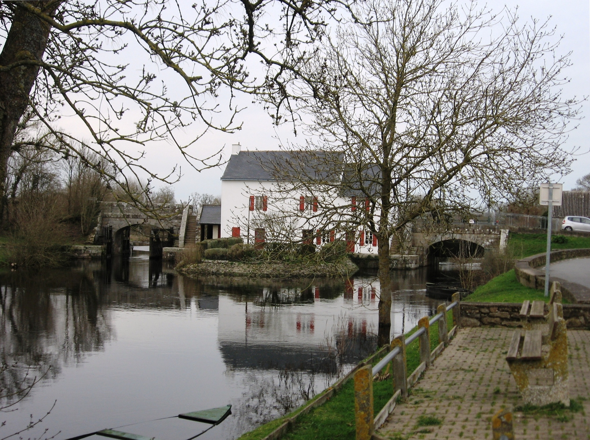 Saint-Malo-de-Guersac